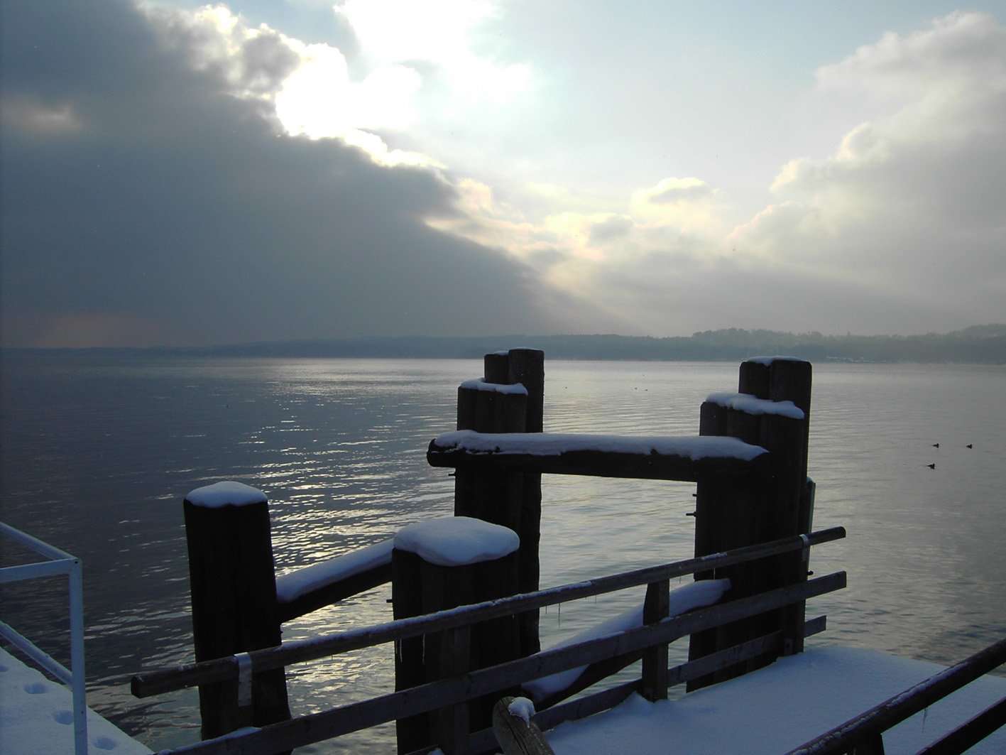 Starnberger See in Winterstimmung, Dampfersteg Leoni